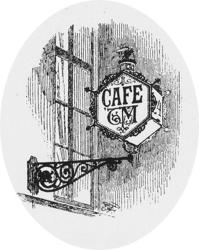 Tysta Maris Café-skylt